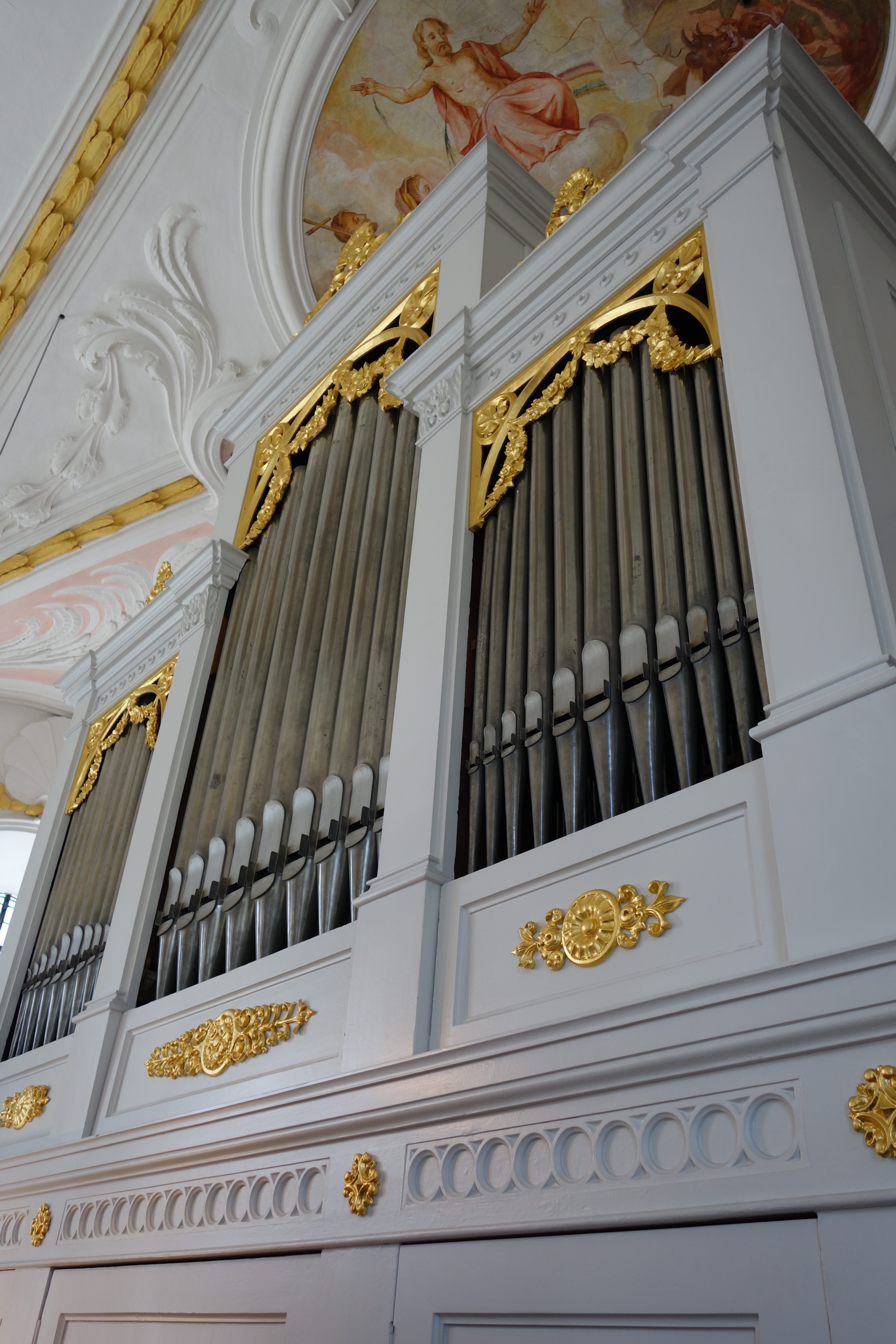 Die Orgel der Alten Sendlinger Kirche